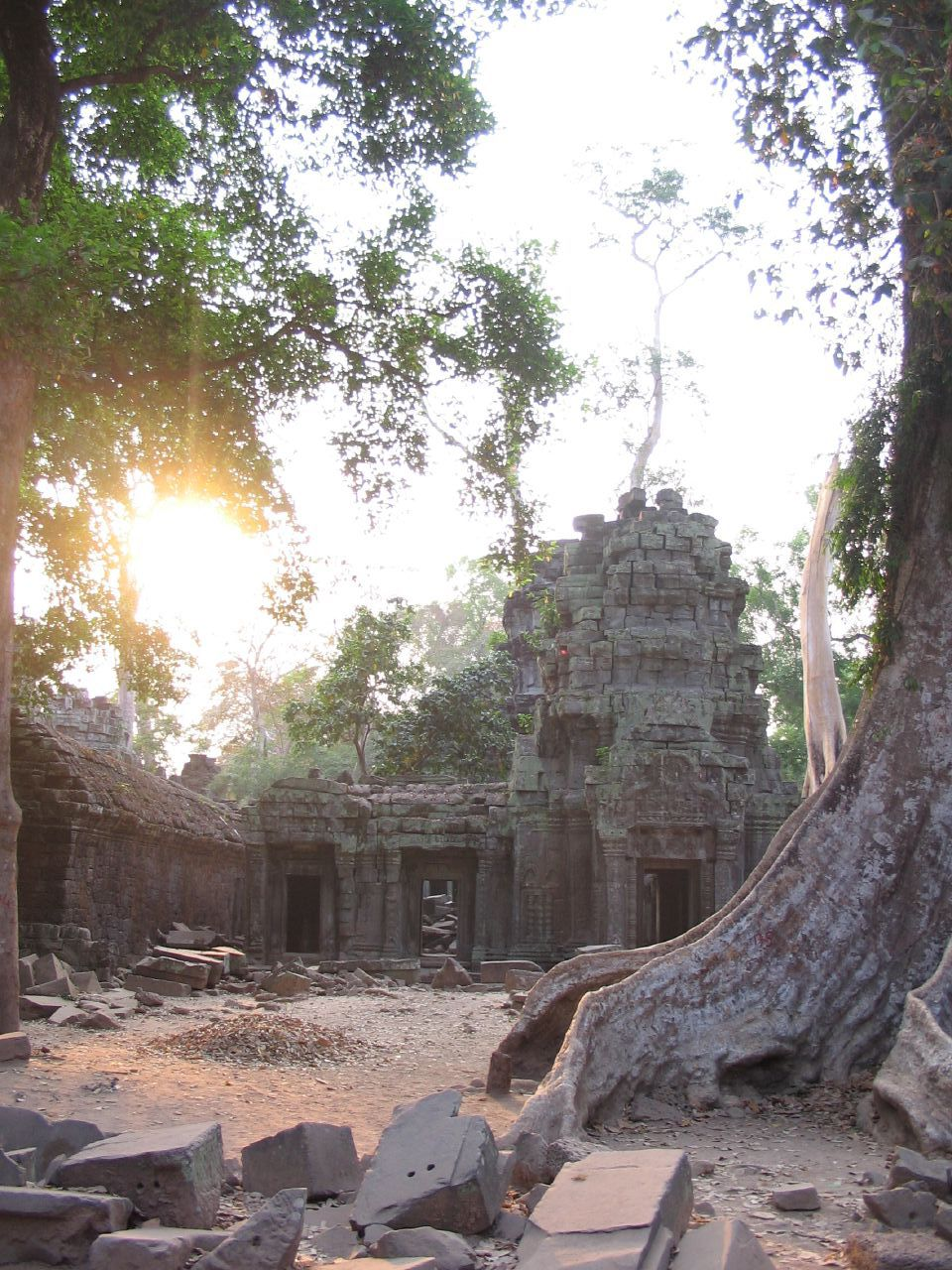 angkor wat "jungle temple"